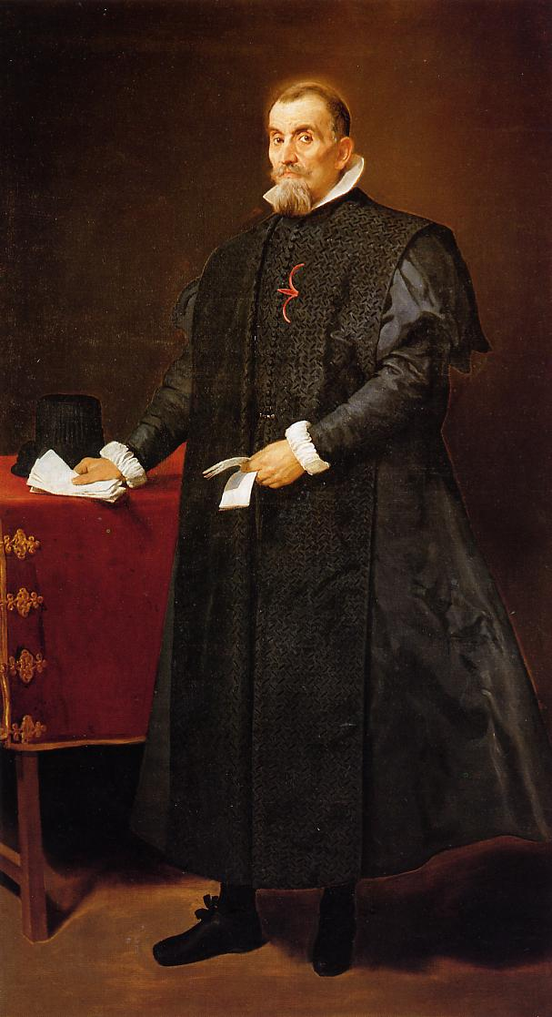 Retrato de Diego del Corral y Arellano (1570-1632), que fue oidor del Consejo de Castilla, caballero de la Orden de Santiago y catedrático de la Universidad de Salamanca. Viste toga negra, detalle que junto a los papeles alude a su oficio en la Justicia, luce la cruz de Santiago bordada en su pechera, símbolo de su origen noble, y se acompaña de un sombrero, que habla del derecho de don Diego a cubrirse como característica de su alto rango social. Cada detalle de la composición, lejos de ser anecdótico, ha sido cuidadosamente elegido por Velázquez, con objeto de caracterizar socialmente a su modelo. La técnica empleada por el pintor, que combina la proximidad del personaje con un fondo y un suelo neutro y un ligero halo alrededor de la cabeza del personaje, sitúan esta obra dentro del estilo de Velázquez de comienzos de la década de los años 30. Este cuadro forma pareja con el retrato de su esposa Doña Antonia de Ipeñarrieta y Galdós, y su hijo don Luis (P01196). Ambos permanecieron en manos de la familia hasta que fueron legados al Museo del Prado por la duquesa de Villahermosa.